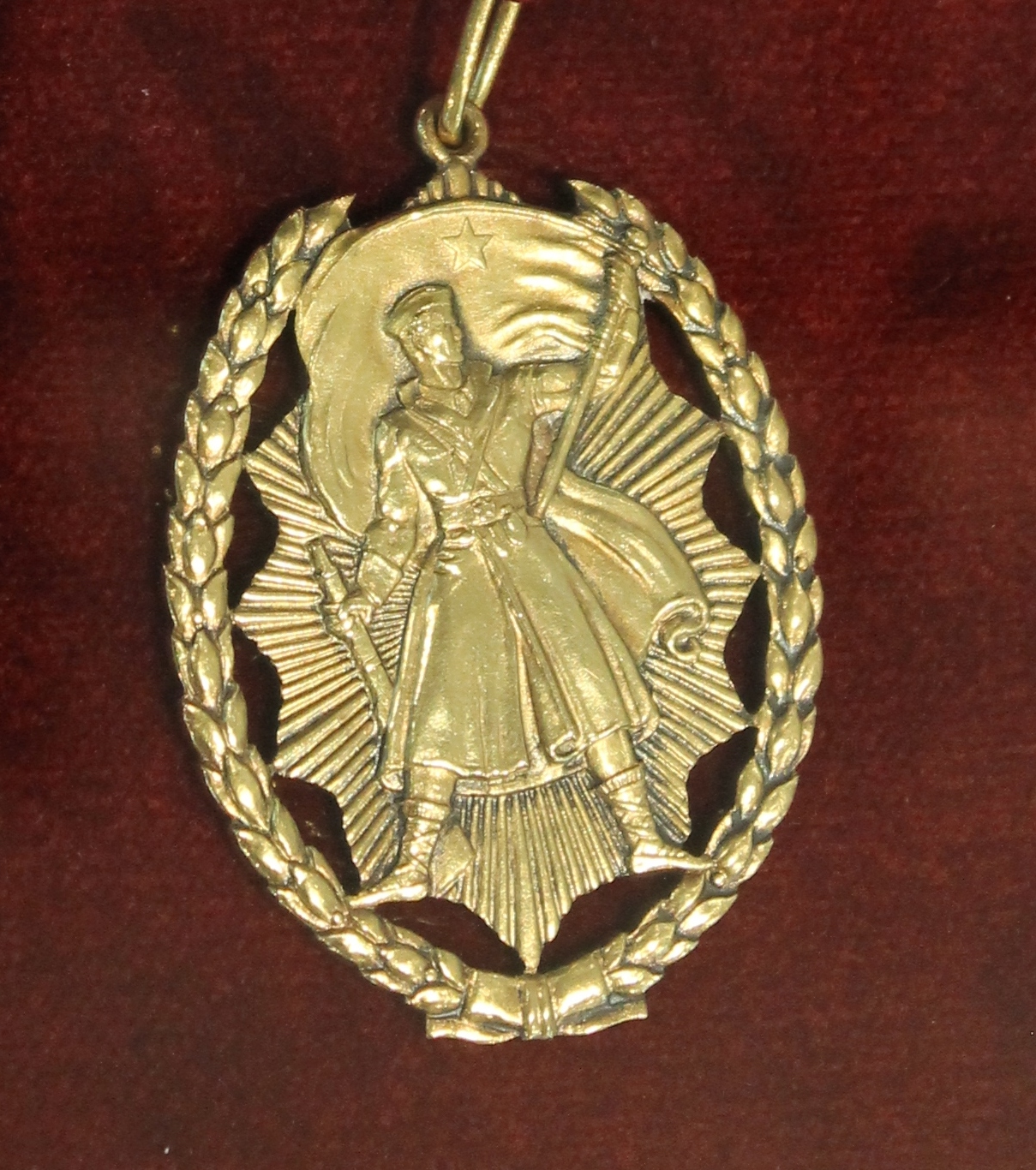 Орден народног хероја - први тип ордена израђиван у СССР